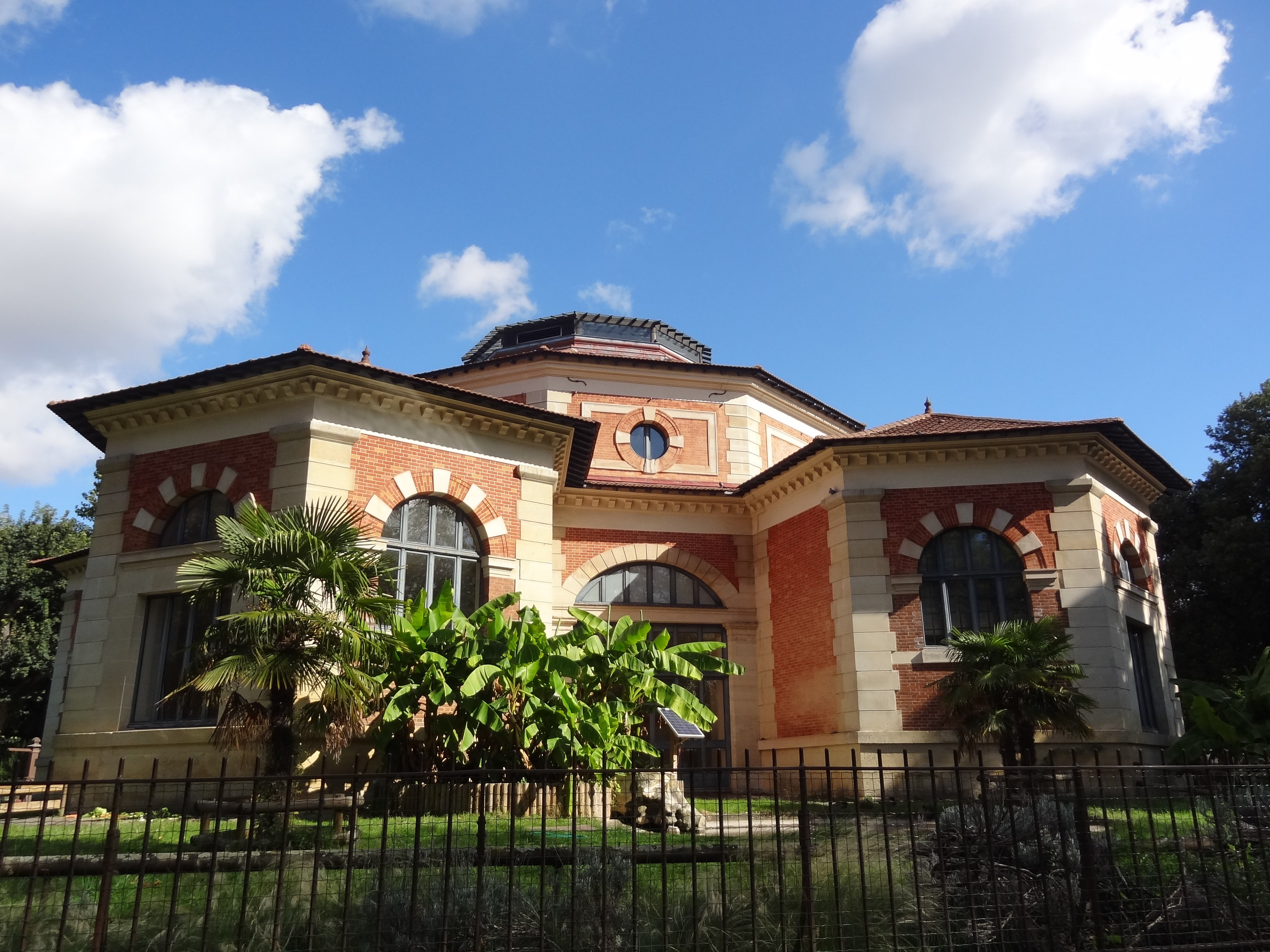 Rotonde de l'éléphant, Jardin des Plantes de Paris. .